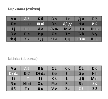 Влашко писмо - ћирилично и латинично.